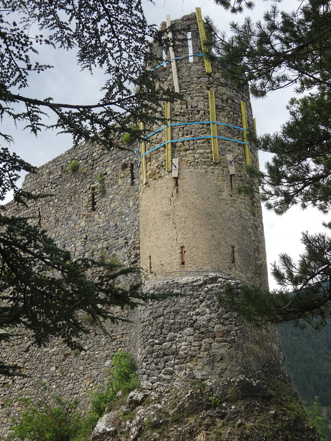 Tour du château de Guillaumes (Alpes-Maritimes), après une première tranche de restauration en 2019.